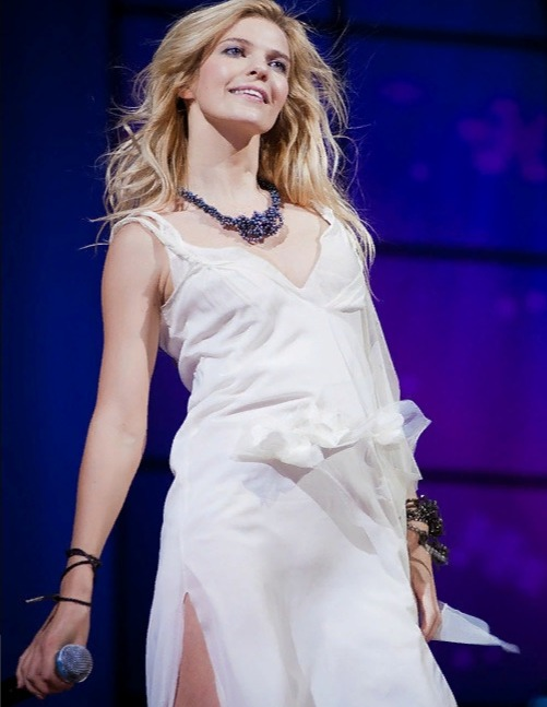 Алёна Торганова на концерте в Тольятти